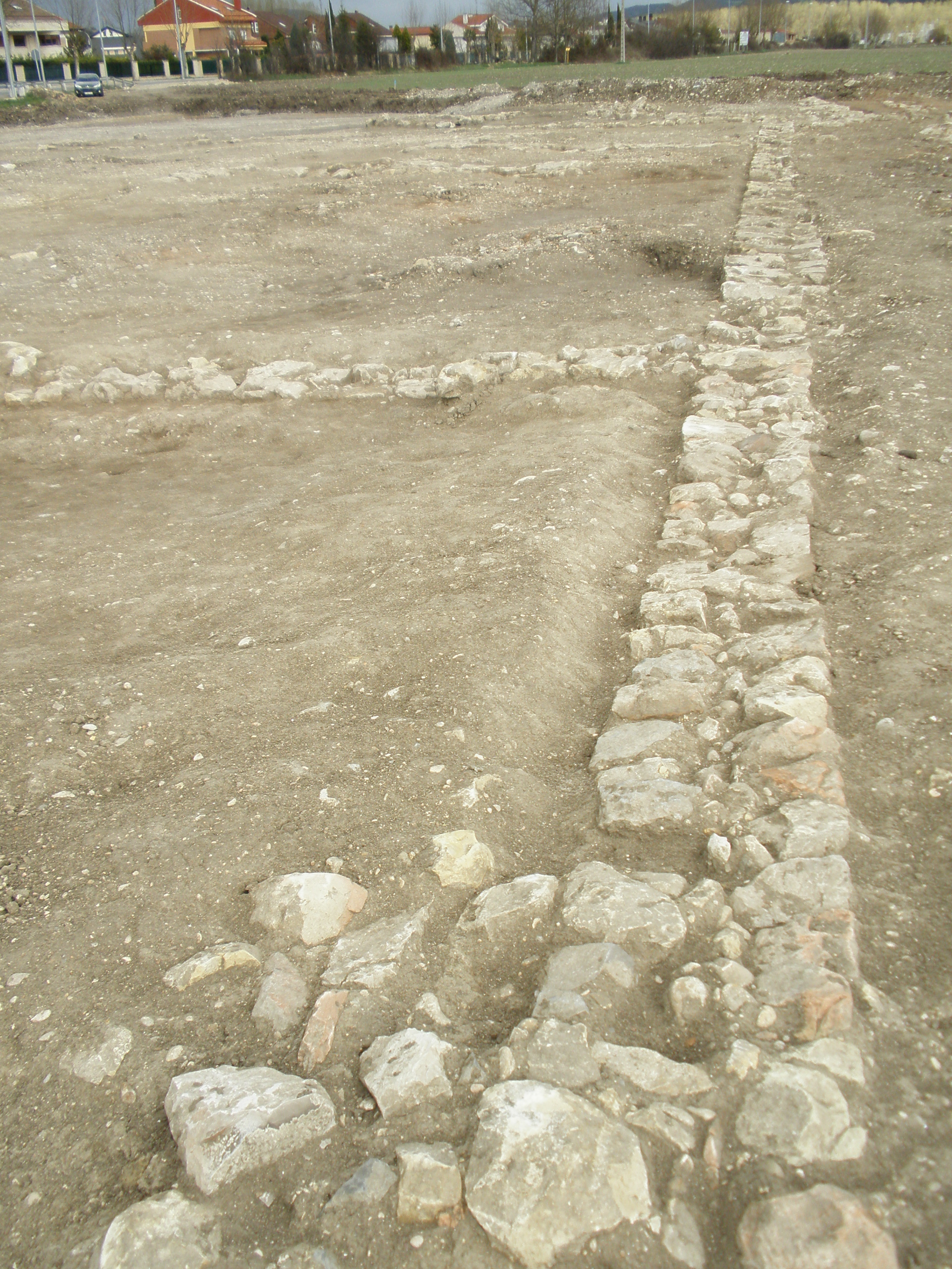 Restos arqueológicos romanos correspondientes a Deóbriga en el yacimiento de Arce-Mirapérez (Miranda de Ebro, España).